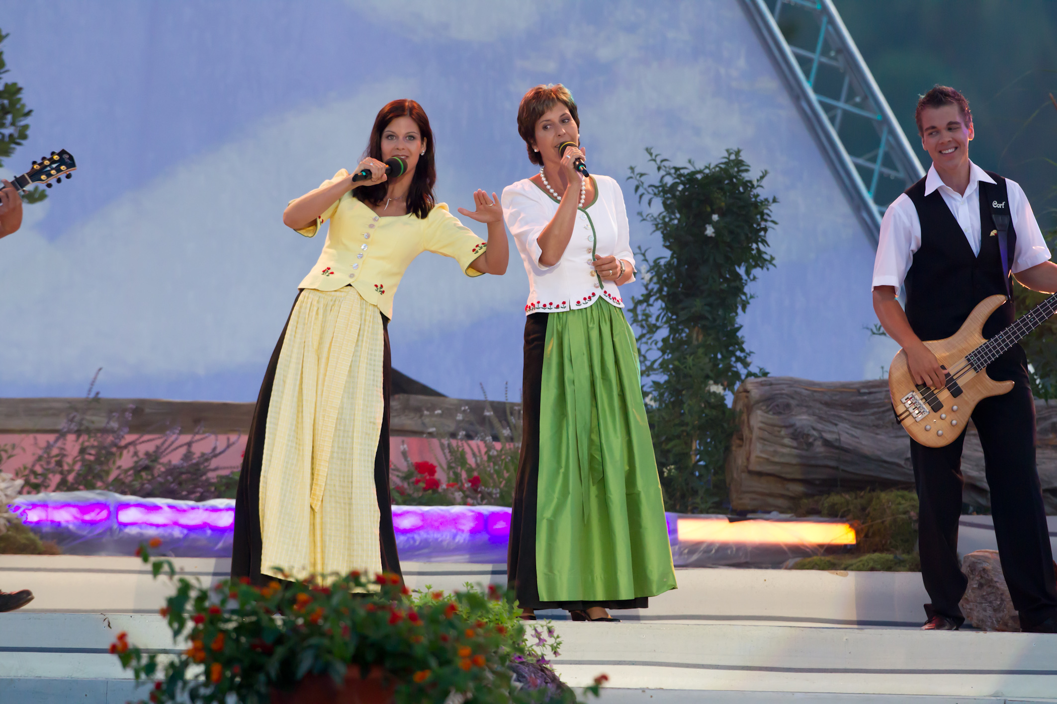 Wenn die Musi spielt - Sommer Open Air